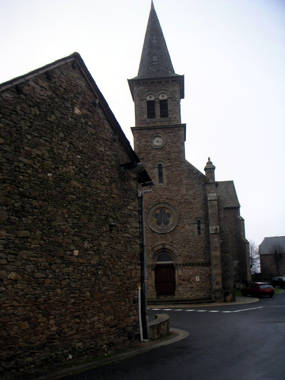 Église de Meljac